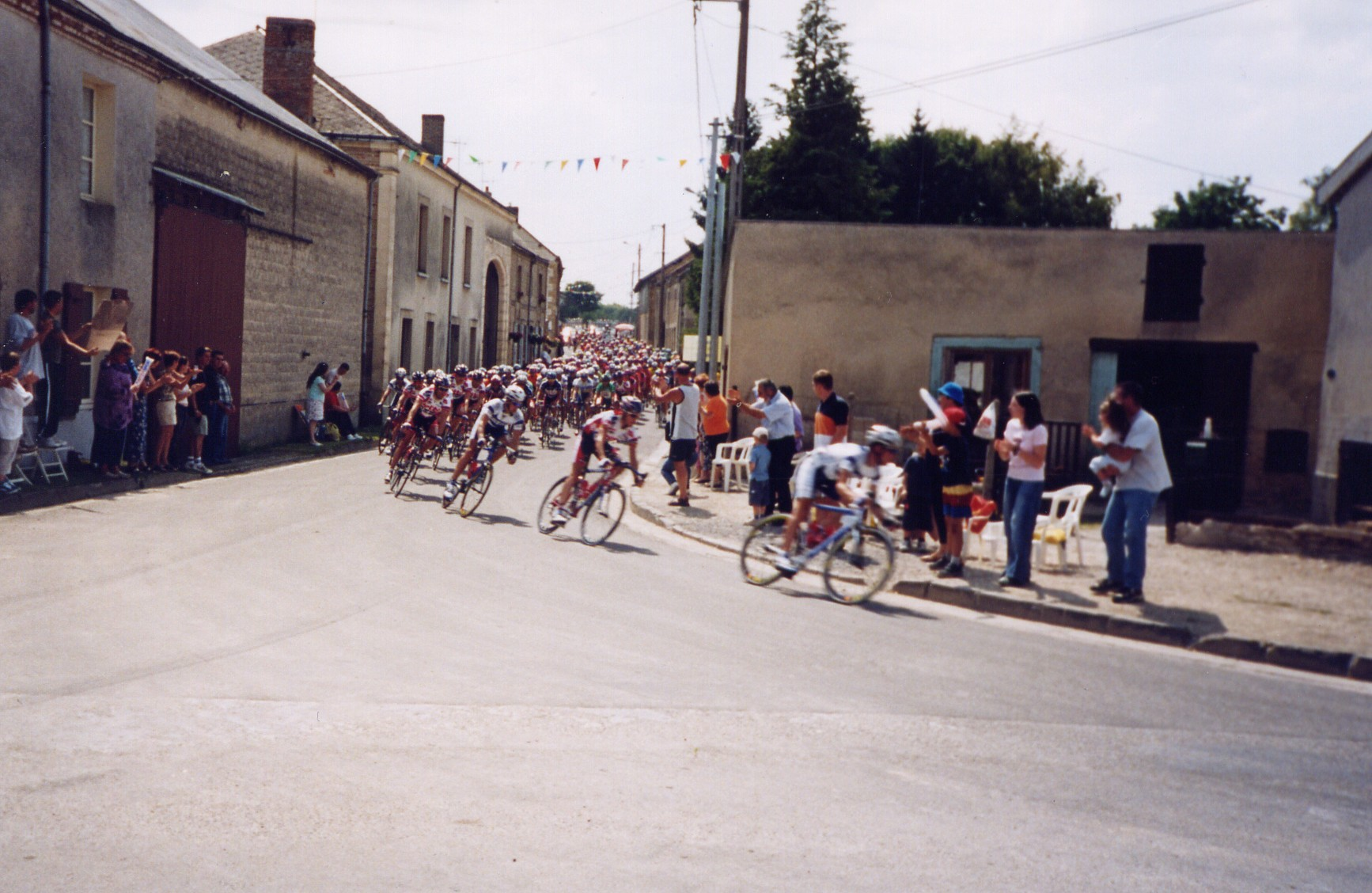 Premier passage du tour à Saint-Loup-en-Champagne le 7 juillet 2003 (deuxième étape La-Ferté-sous-Jouarre - Sedan). Centenaire du tour.